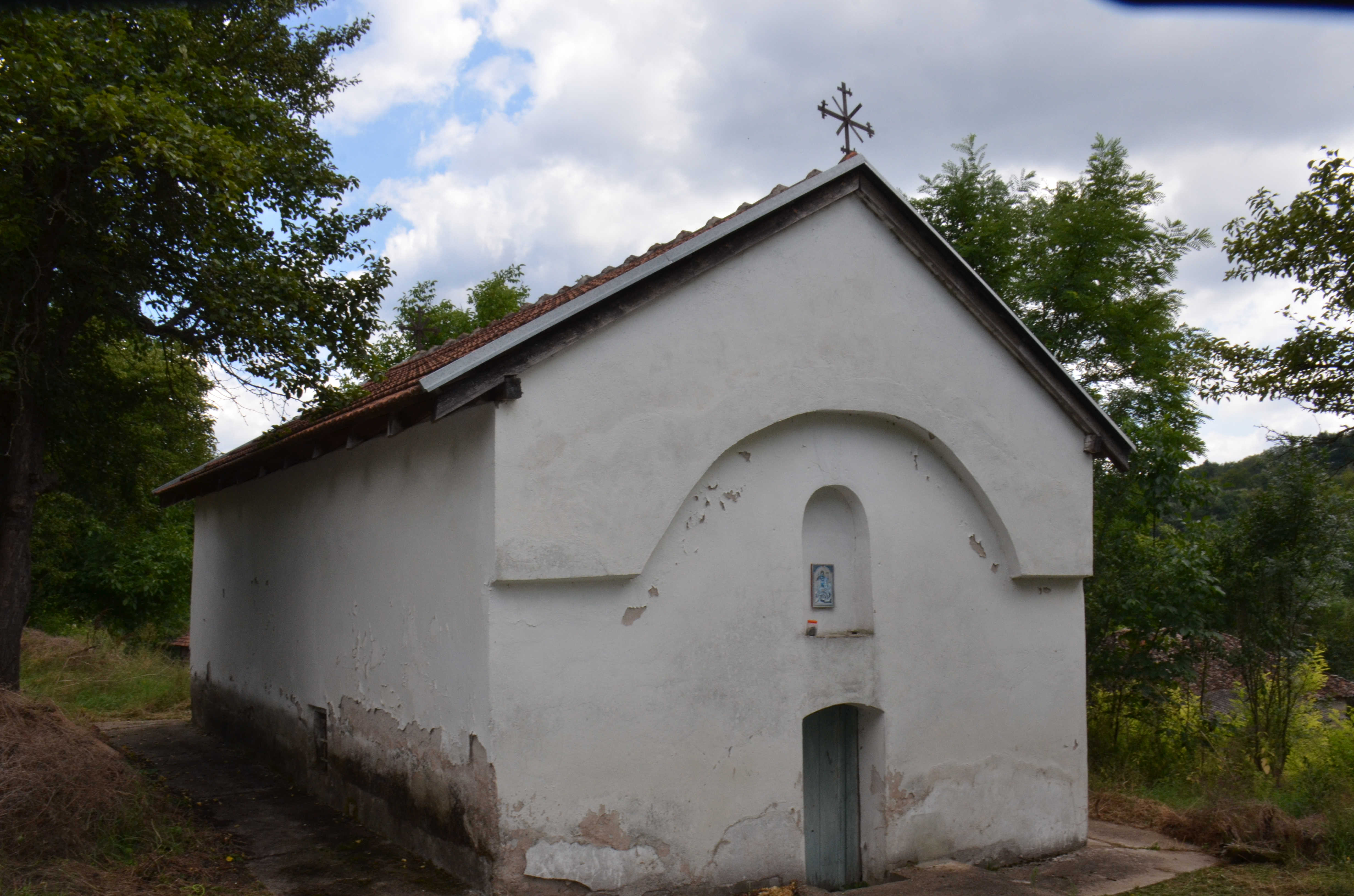 Црква Светог Ђорђа, село Осмаково, општина Пирот, Пиротски округ